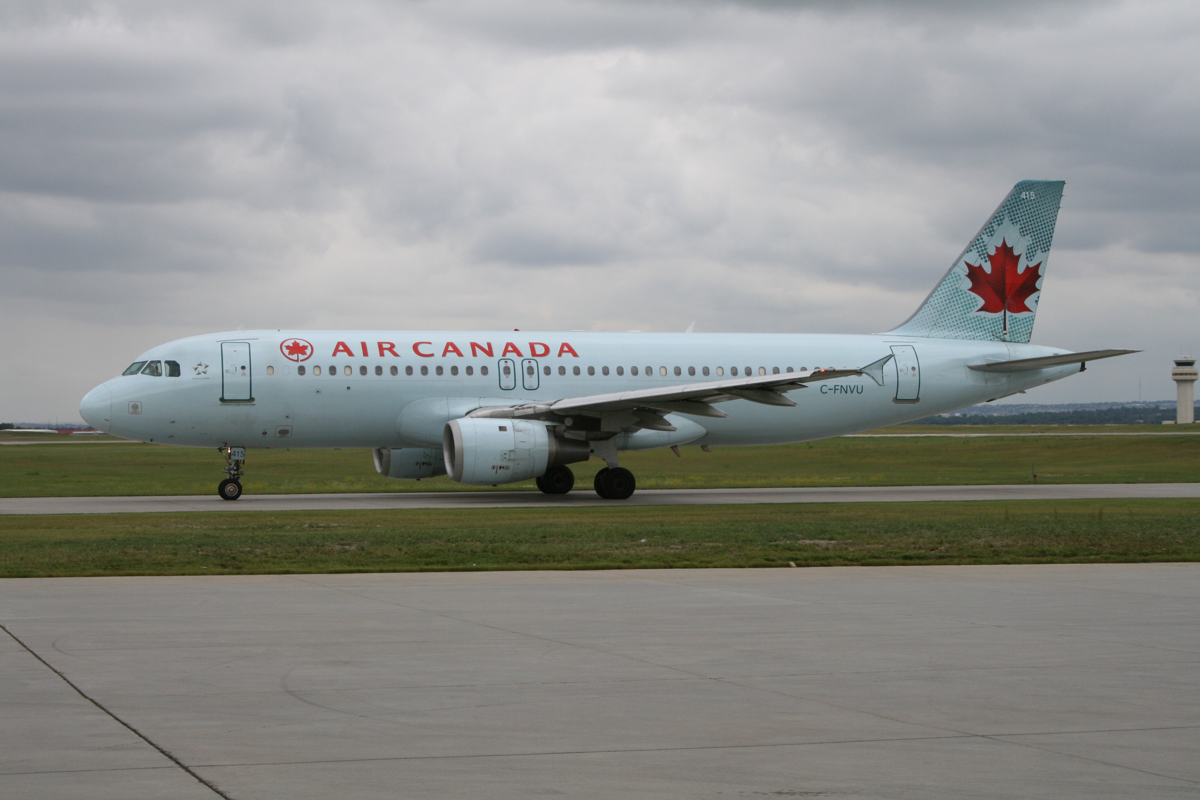 AC A320